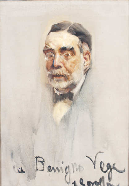 Pintura al óleo. Retrato de Benigno de la Vega-Inclán (1858-1942), Marqués de la Vega-Inclán.